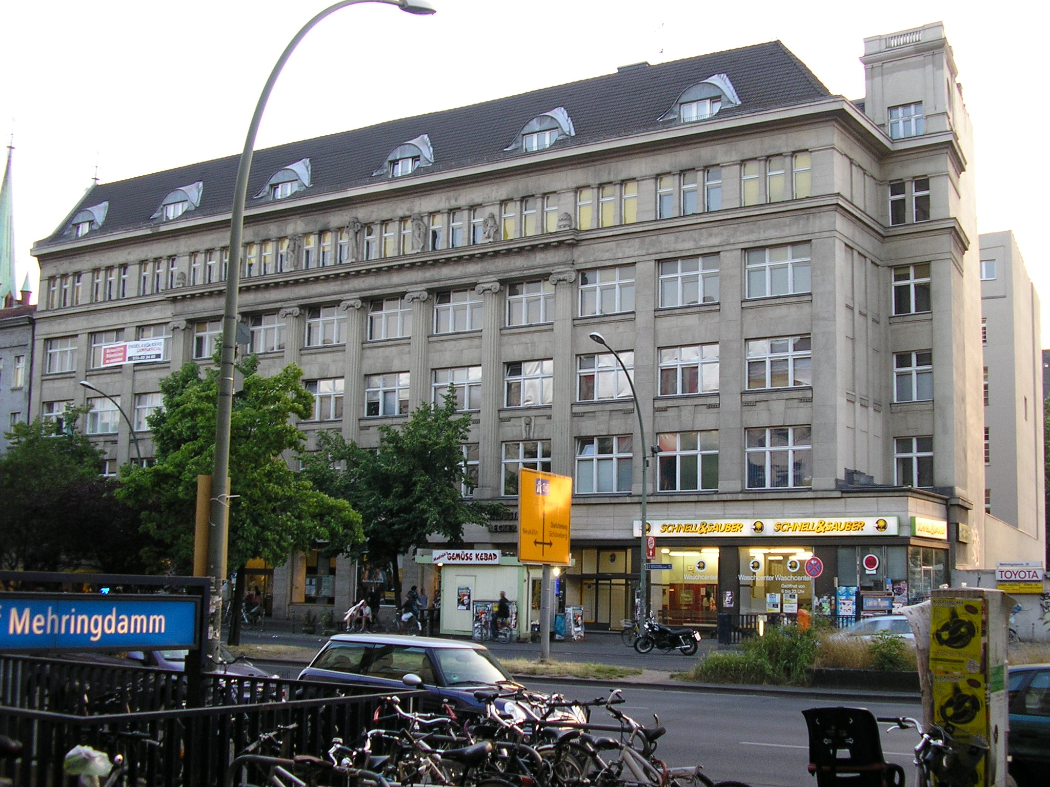 Ehemaliges Gebäude von Telefunken, Bereich Hochfrequenzgeräte